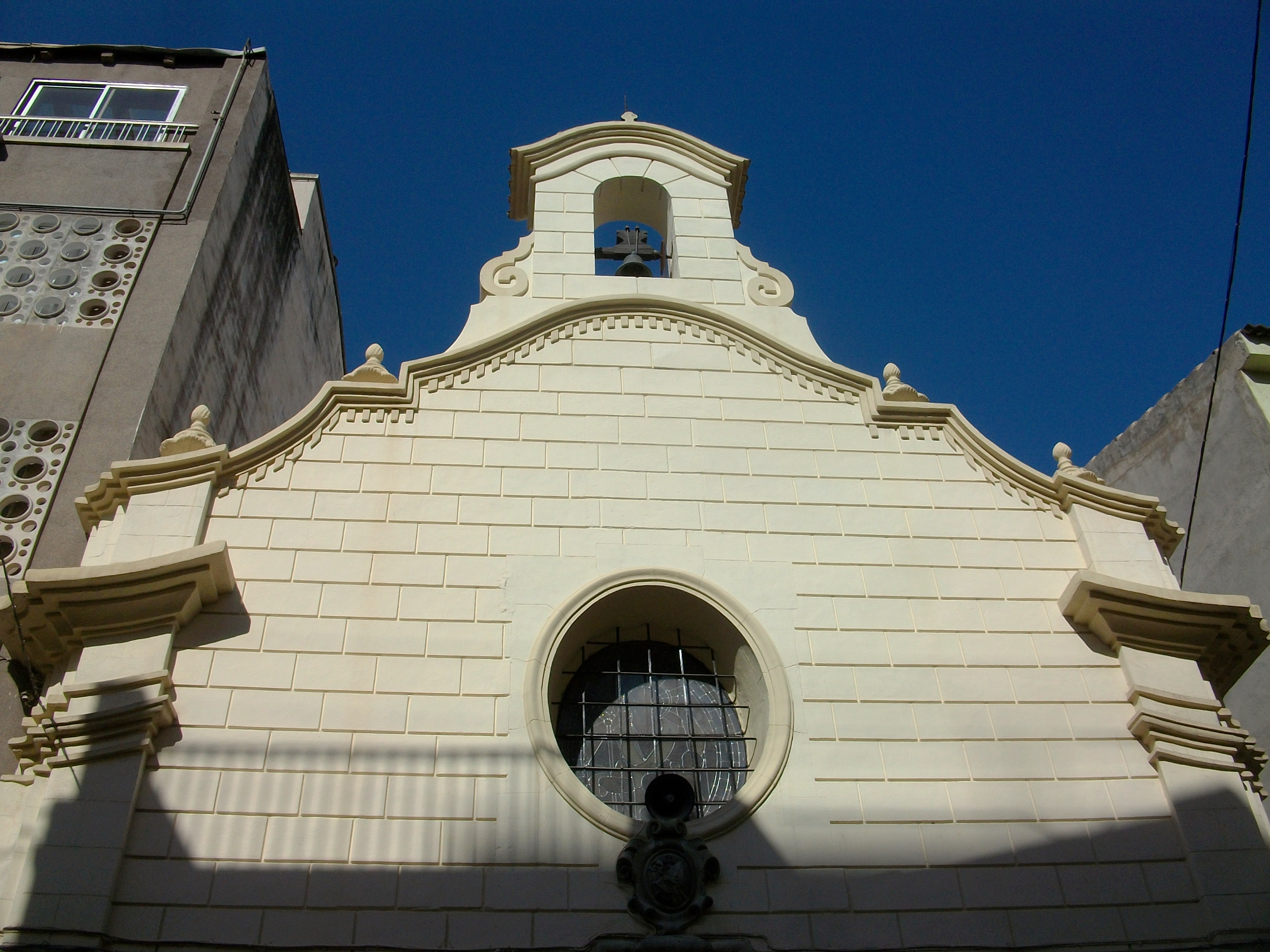 Part superior de la façana de l'església o ermita de sant Nicolau de Bari, Castelló de la Plana.